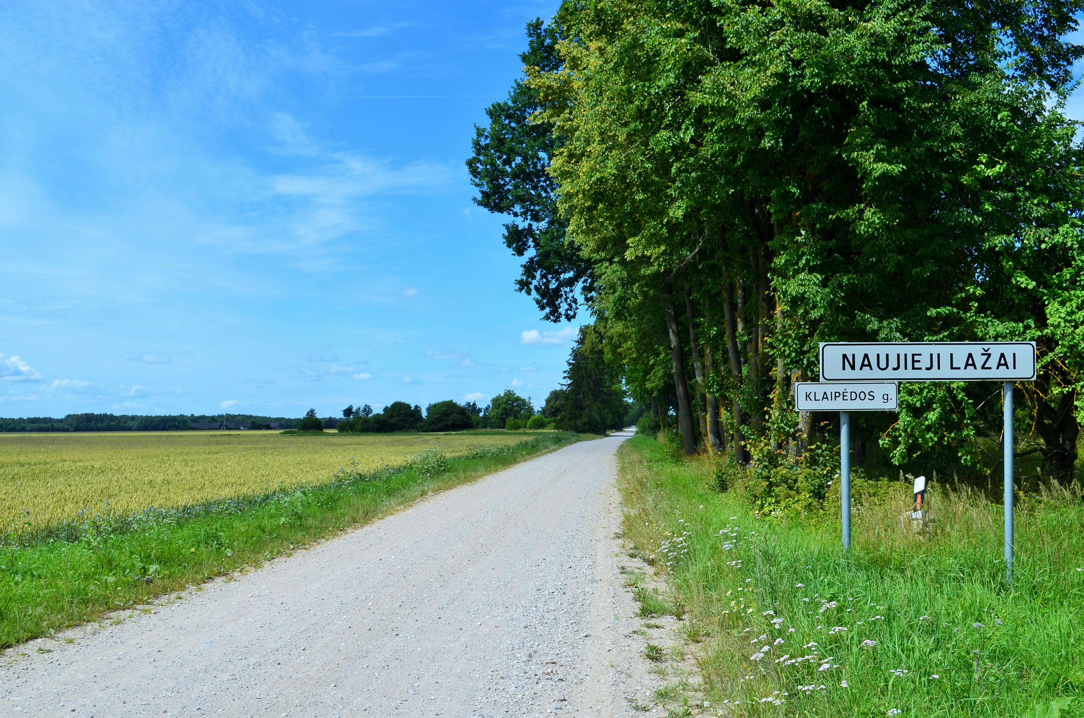 Naujieji Lažai, Kėdainių raj.